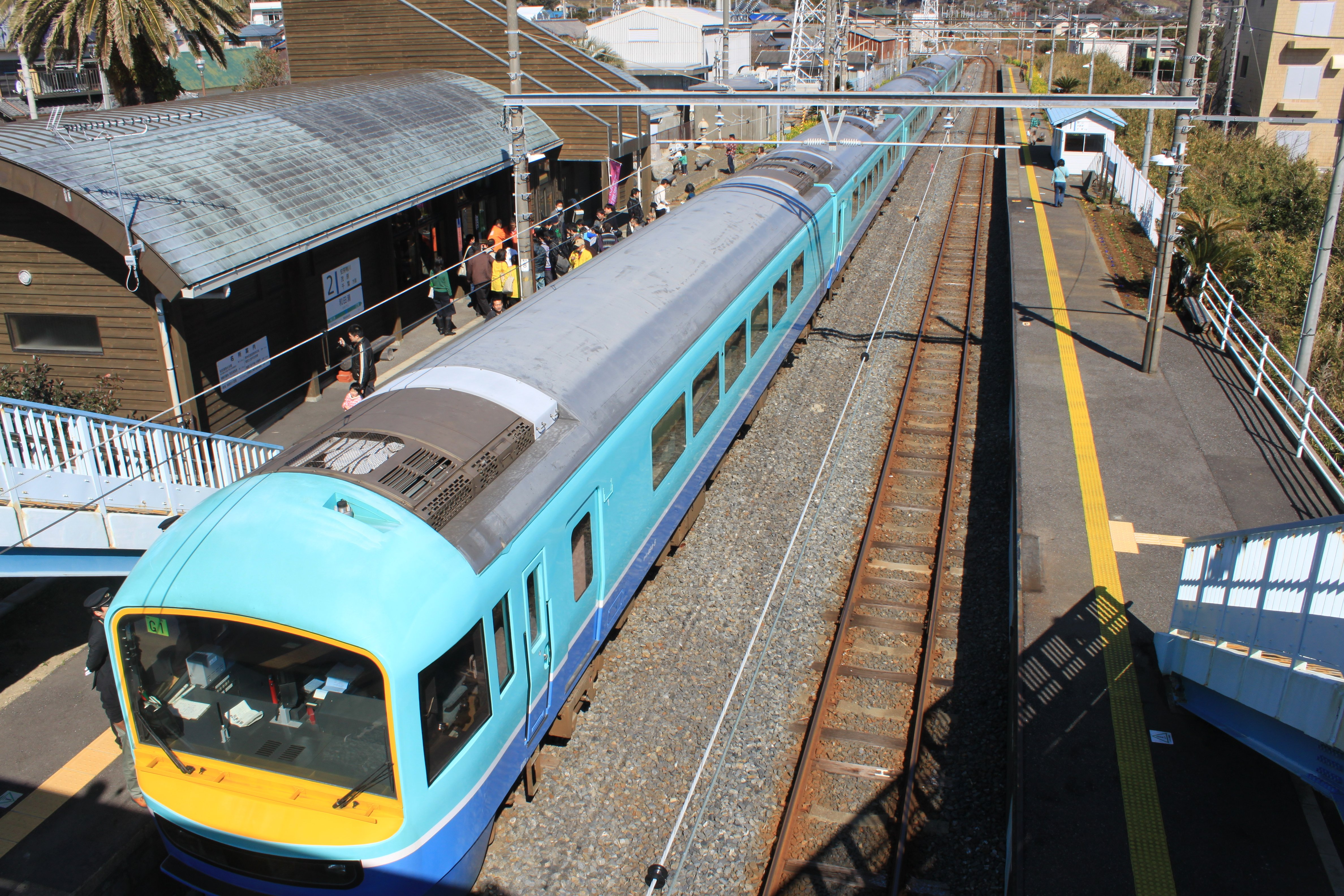 和田浦駅